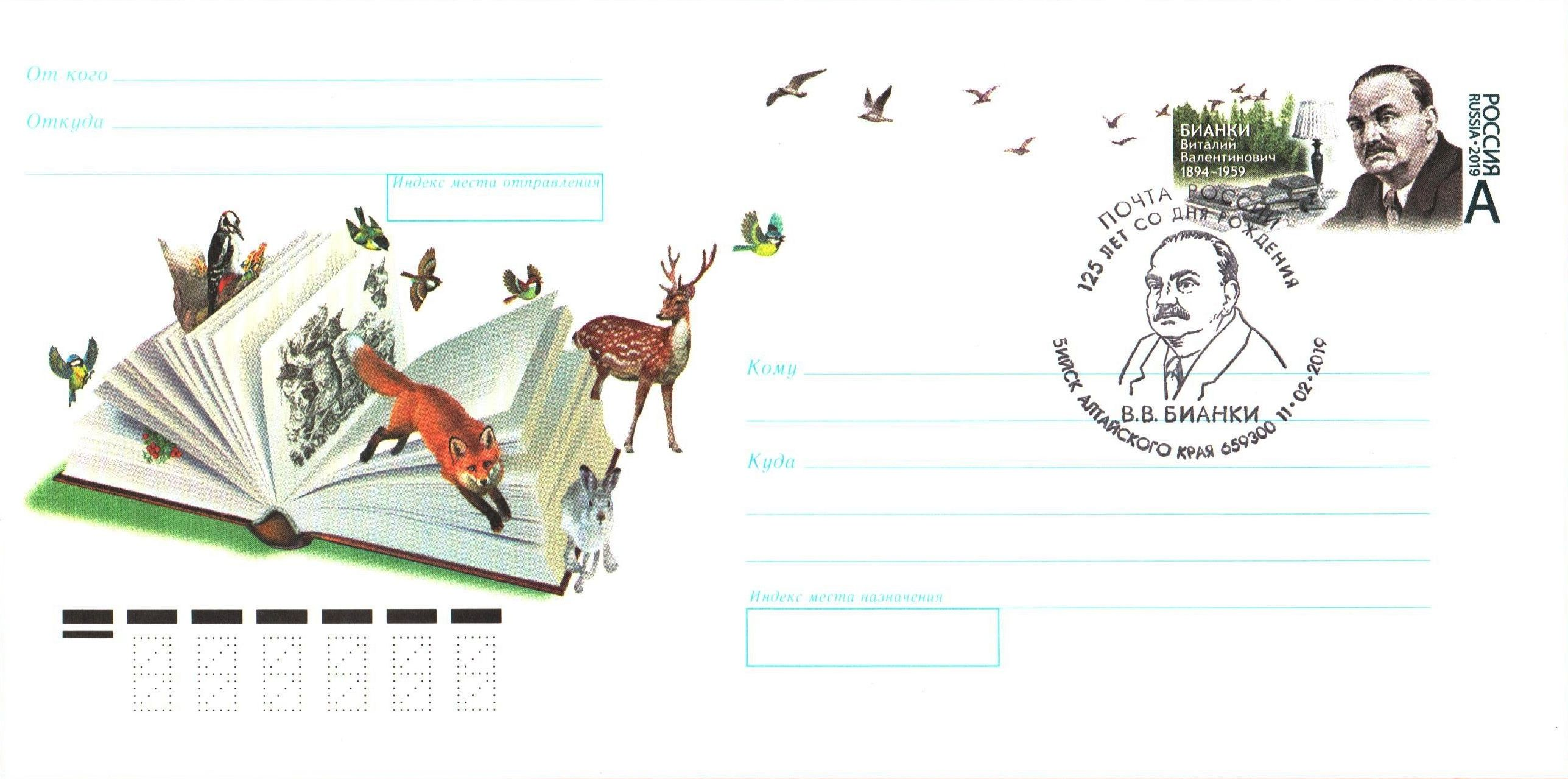 Бианки Виталий Валентинович, почтовый конверт